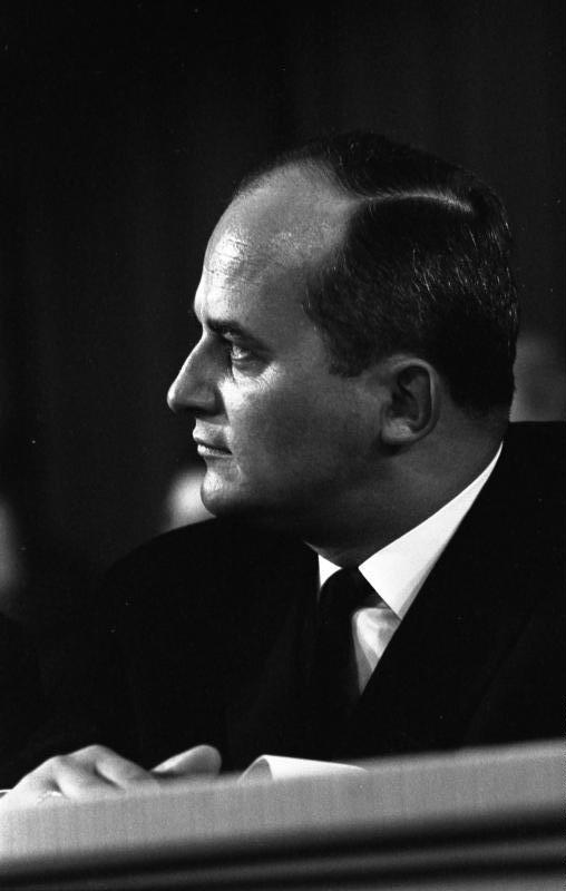 CDU - Bundesparteitag in Düsseldorf Dr. Rainer Barzel